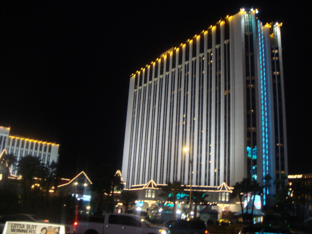 Foto del Tropicana